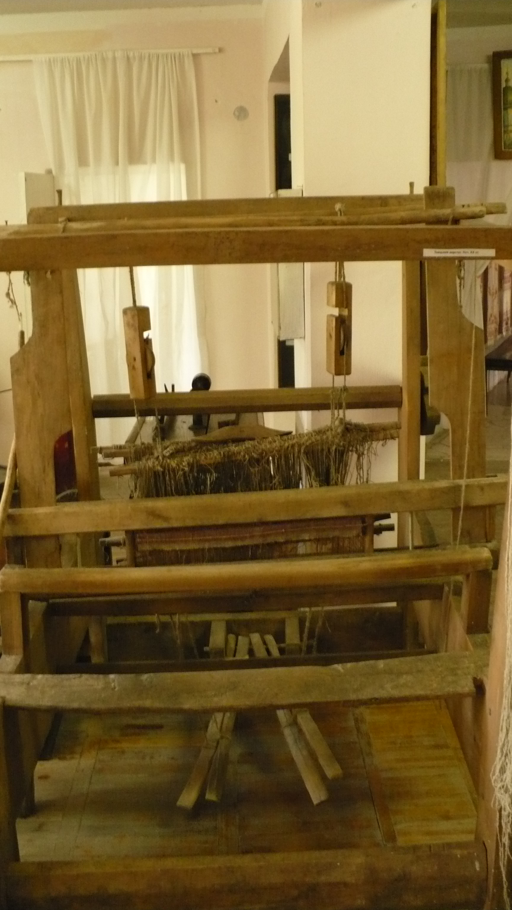 Миргородський Краєзнавчий музей (усередині 34). Внутрішній вигляд Миргородського Краєзнавчого музею